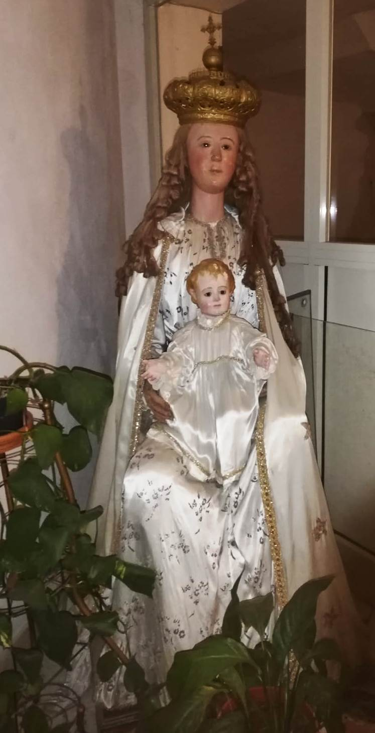 Immagine della statua della madonna della Montagna di Radicena